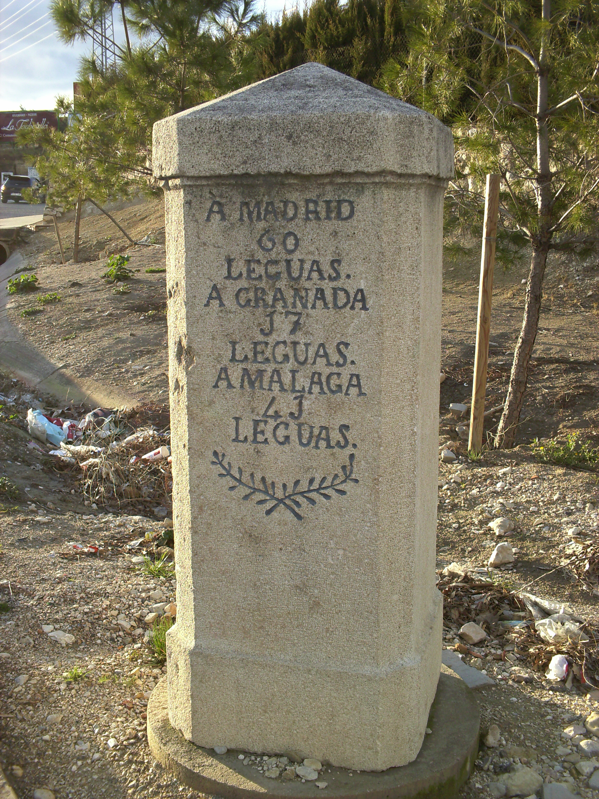 Hito con distancias marcadas en leguas cerca de la glorieta del Tanatorio, en Jaén.